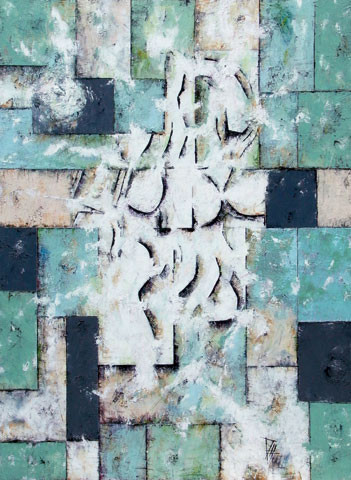 Canvas 50613 Capri, 2005 · Öl auf Leinwand · 190x140 cm.